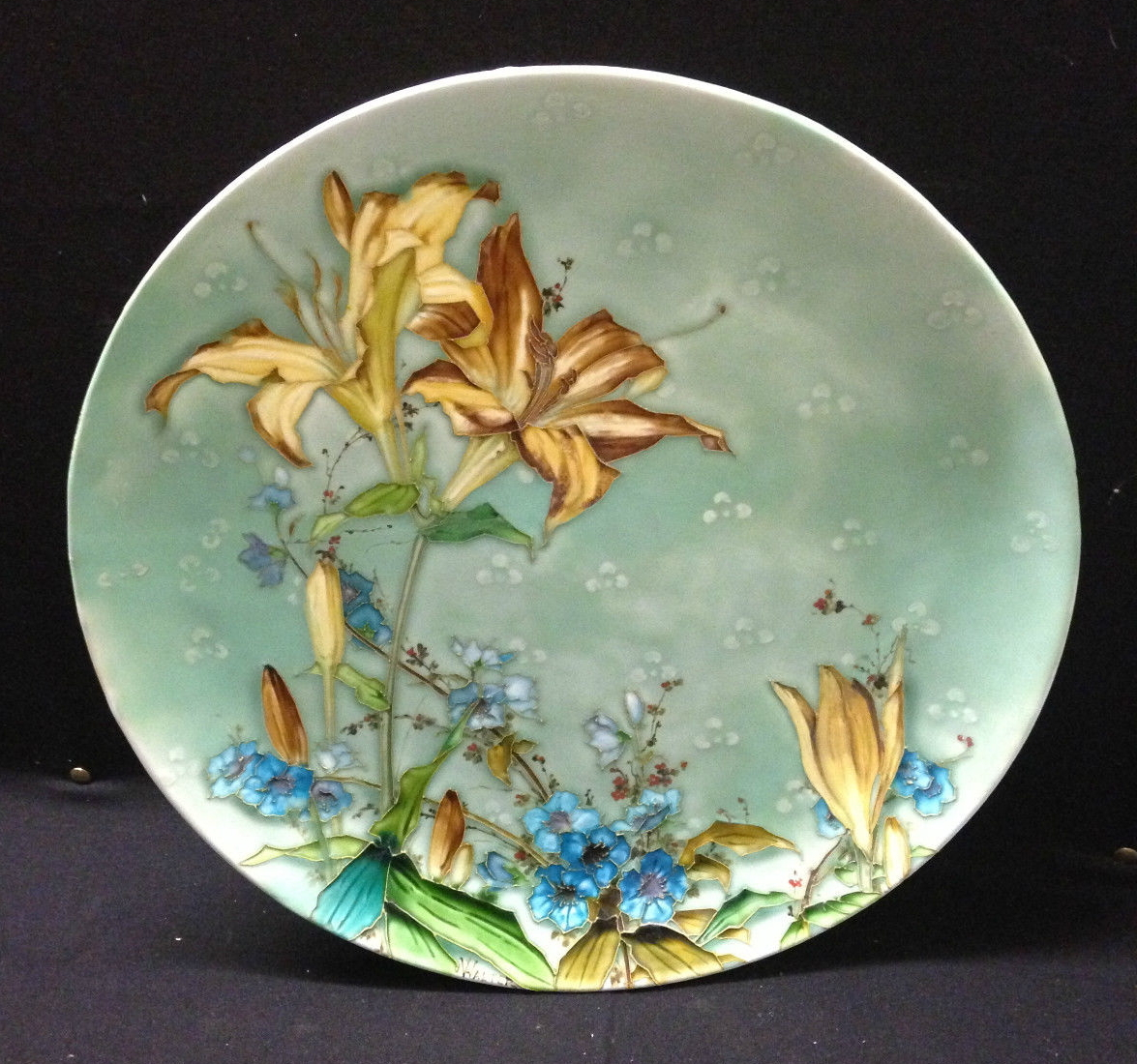 Amalric WALTER, Grande assiette en faïence, ca.1900, diam.: 29,5cm